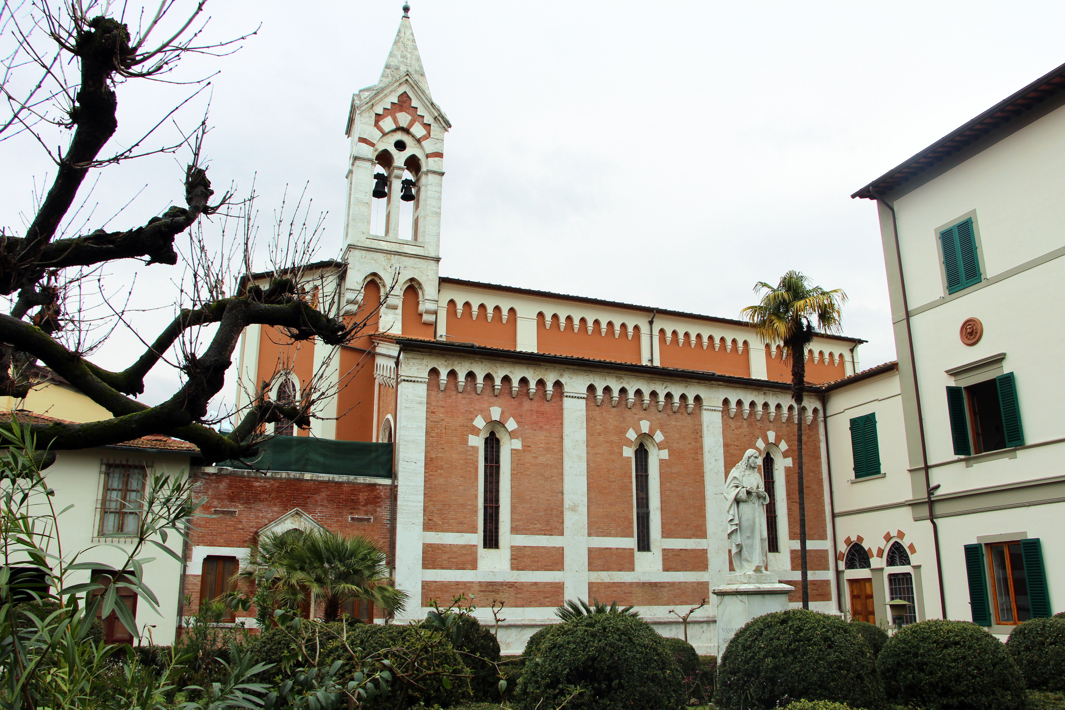 Bernardino poccetti, nozze di cana, 1604, 01.JPG